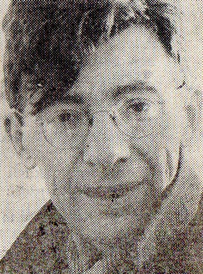 Andrzej Bieżan. Polski kompozytor.